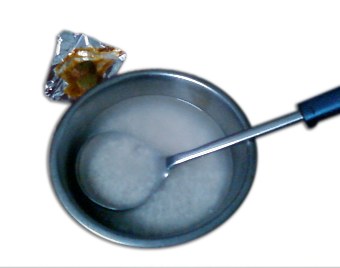 കഞ്ഞിയും അച്ചാറും